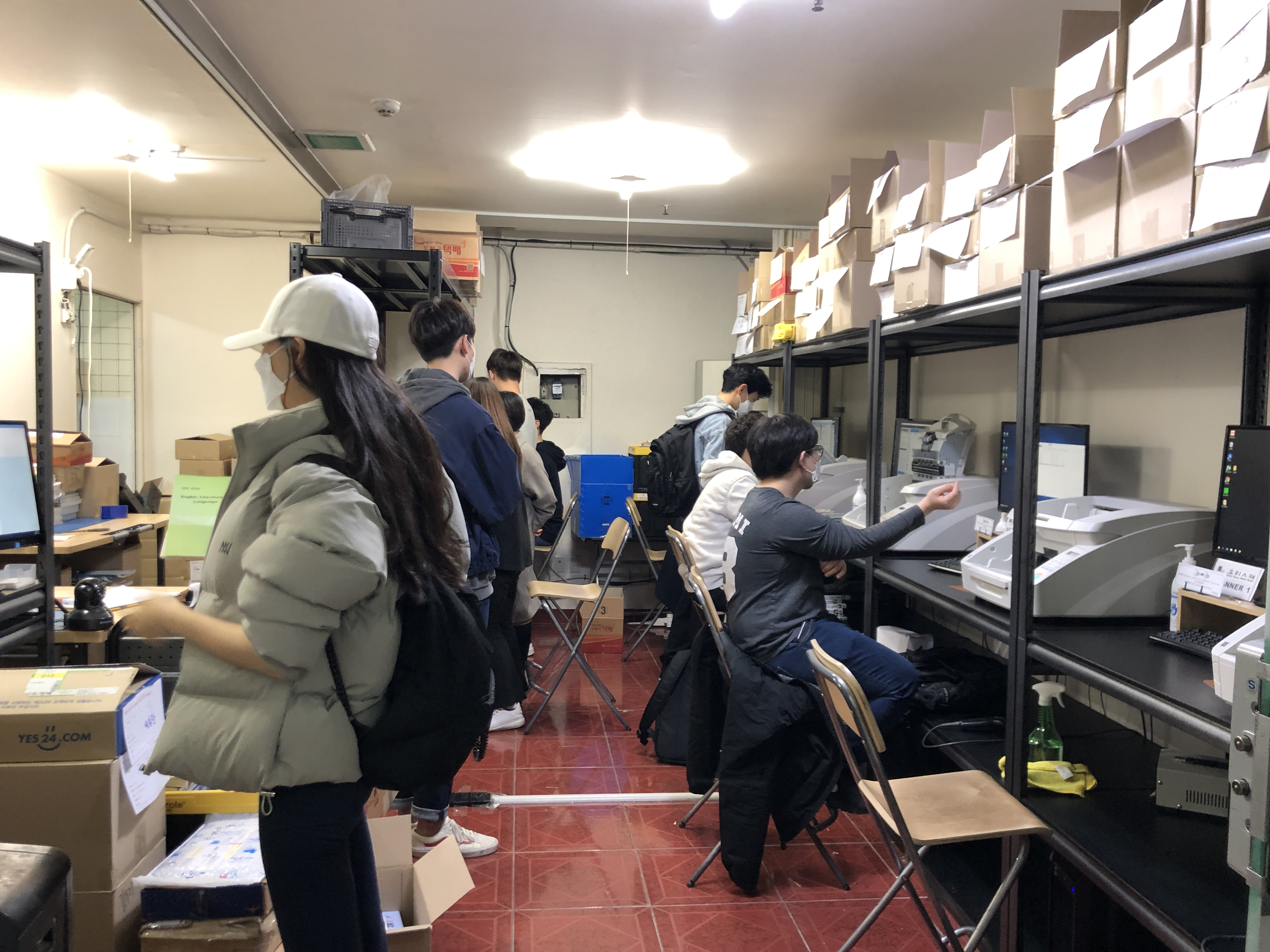 대한민국의 스캔방